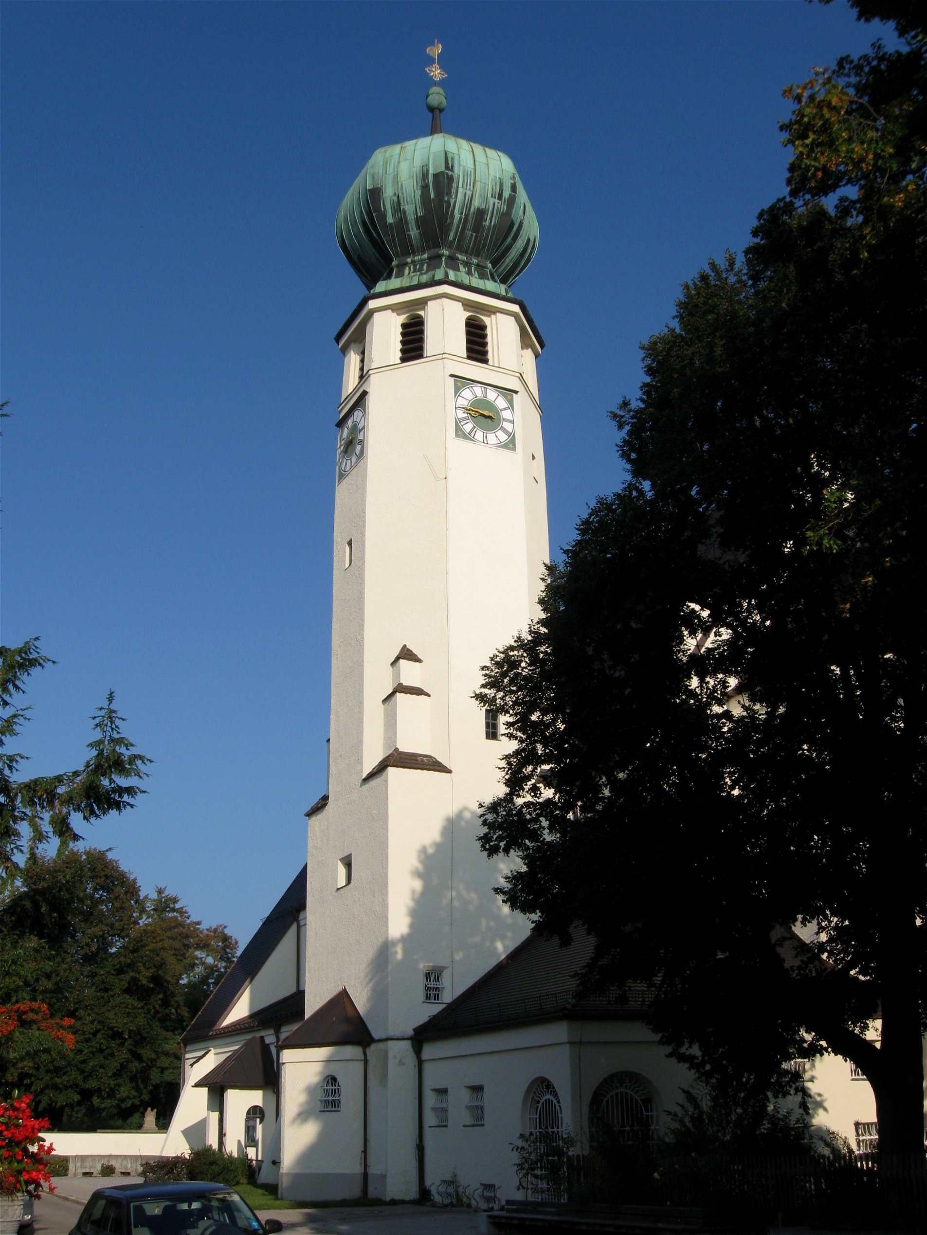 Canisiusplatz 1; Kath. Pfarrkirche St. Canisius, barockisierend, 1925-26 von Franz Rank.